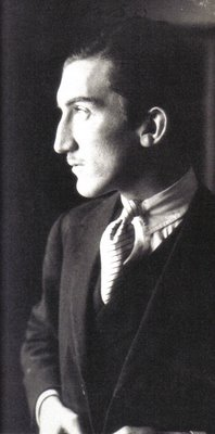 Alfonso Ponce de León Cabello 1906-1936